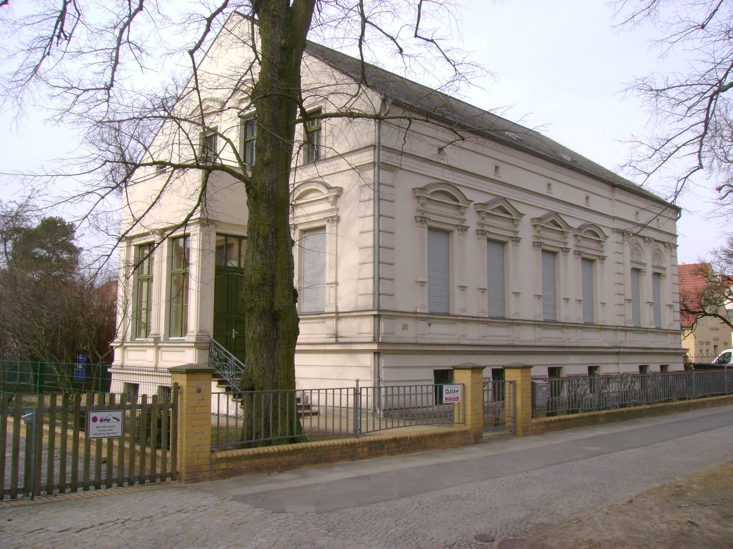 Denkmalgeschütztes Wohnhaus in Velten Breite Straße 31